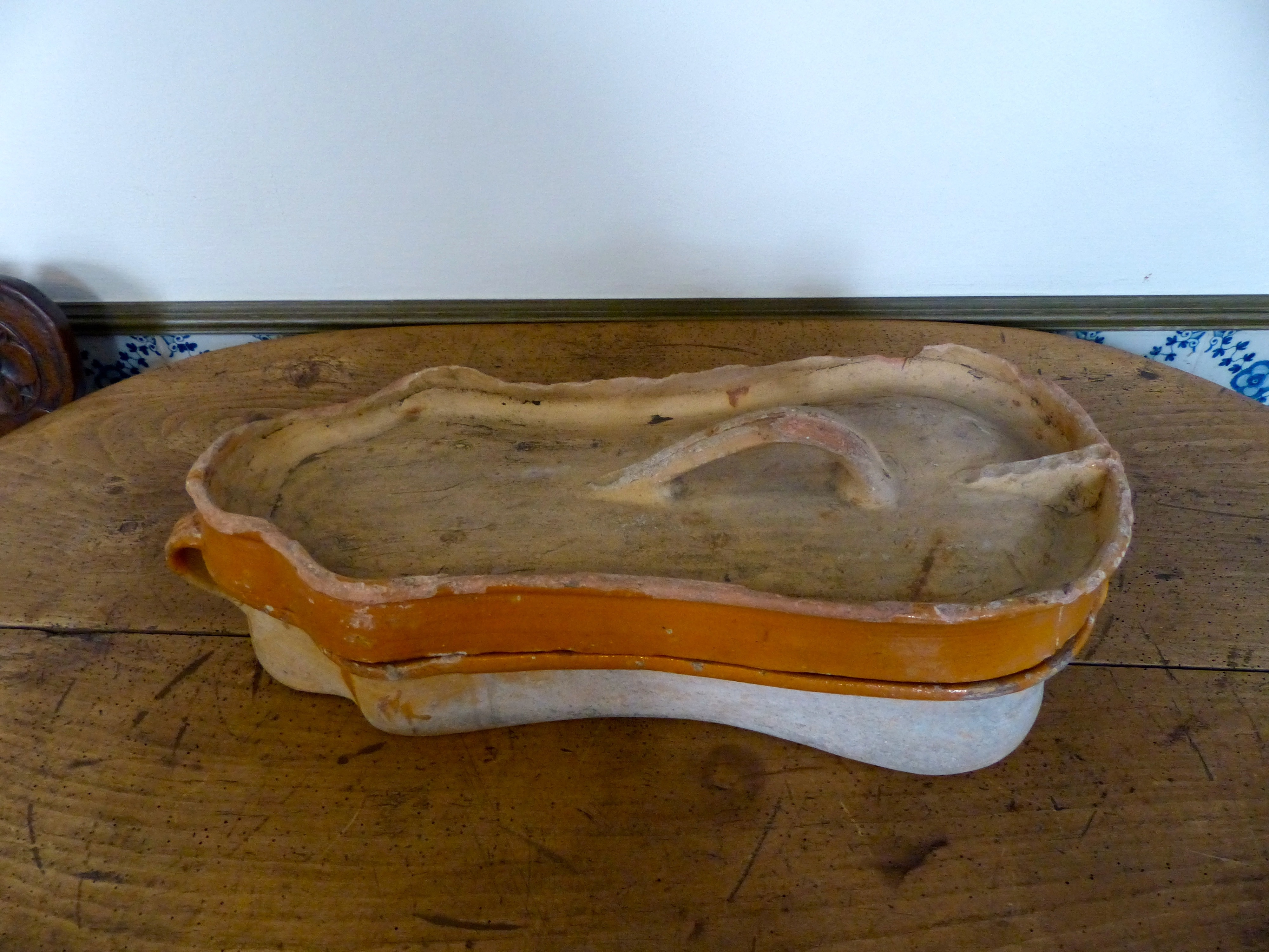 Museum im Couven-Museum (Detail): Aufbewahrungsgefäß mit Deckel